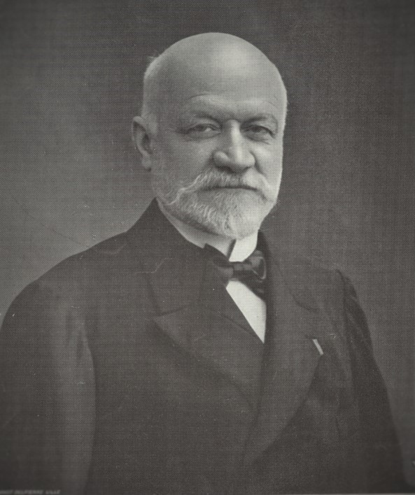 Collection de portraits Réf. image : CIPH0352a Professeur Duret Mots-clés : Publicités et réclames s.d. Cote : CIPH0352a Editeur : Deschiens Photographe : Delpierre Technique : Impr. photomécanique - Similigravure Publicité pour le sirop d'hémoglobine Deschiens Fiches bio-bibliographiques : DURET (Henri) - Adresse permanente de cette image : Professeur DuretCollection BIU Santé - Licence ouverte